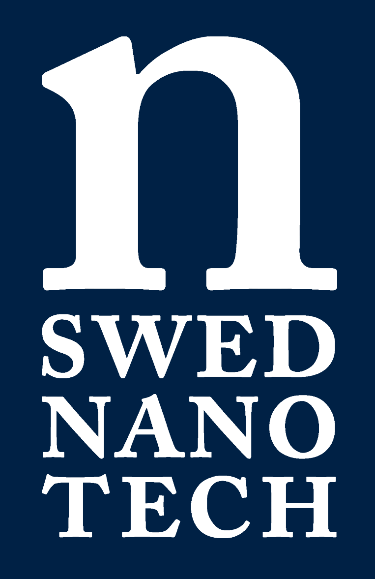 Logga SwedNanoTech